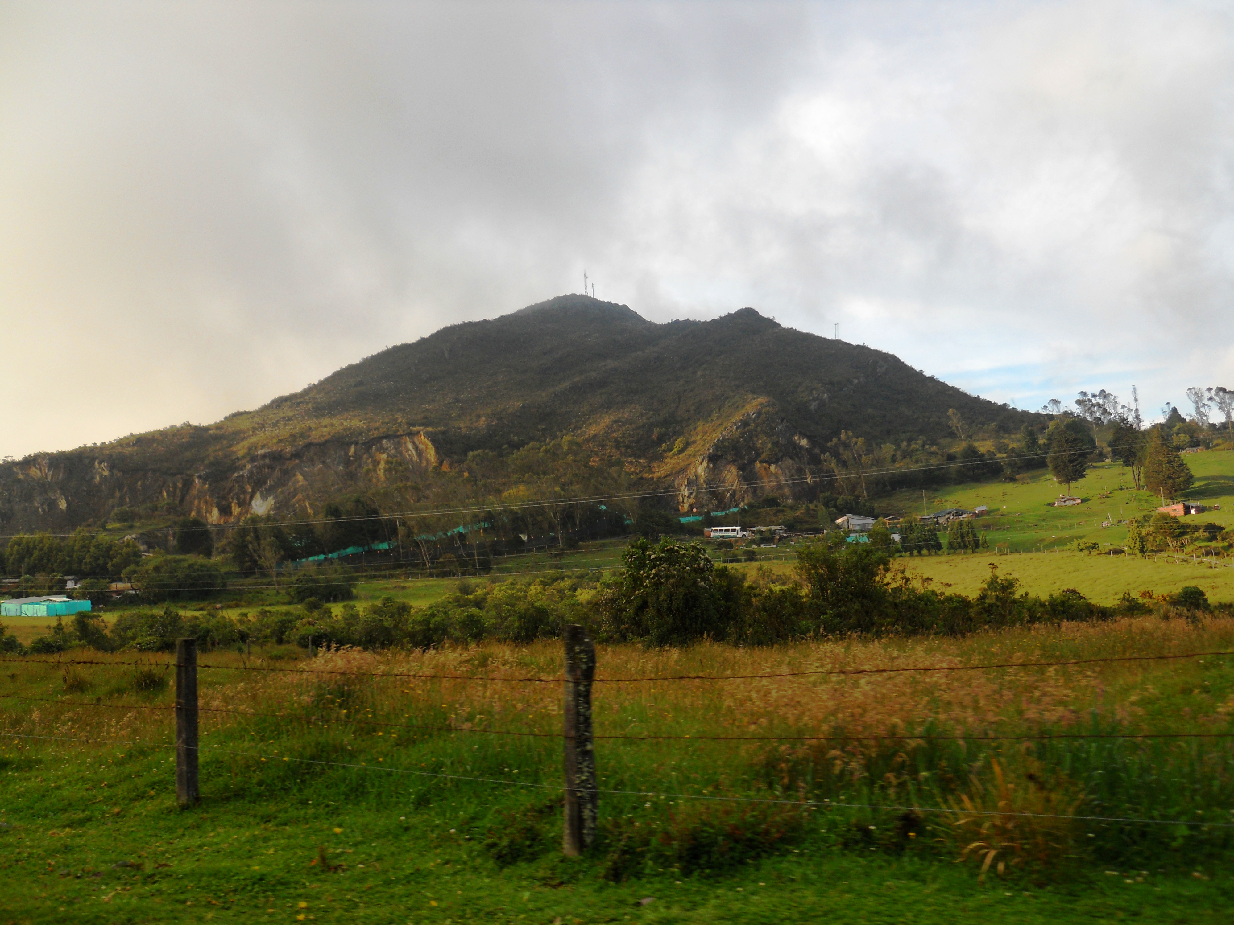 Cerro en el páramo de Cruz Verdedetrás de los cerros orientales de la ciudad.